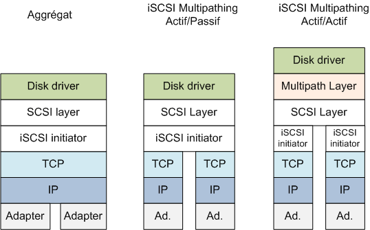 Comparaison entre l'aggrégat, le multipathing iSCSI actif/passif et Actif/Actif